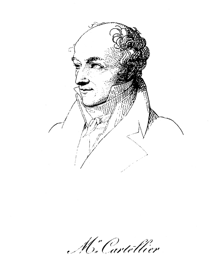 Cartellier dessiné par Fremy, d'après son portrait peint